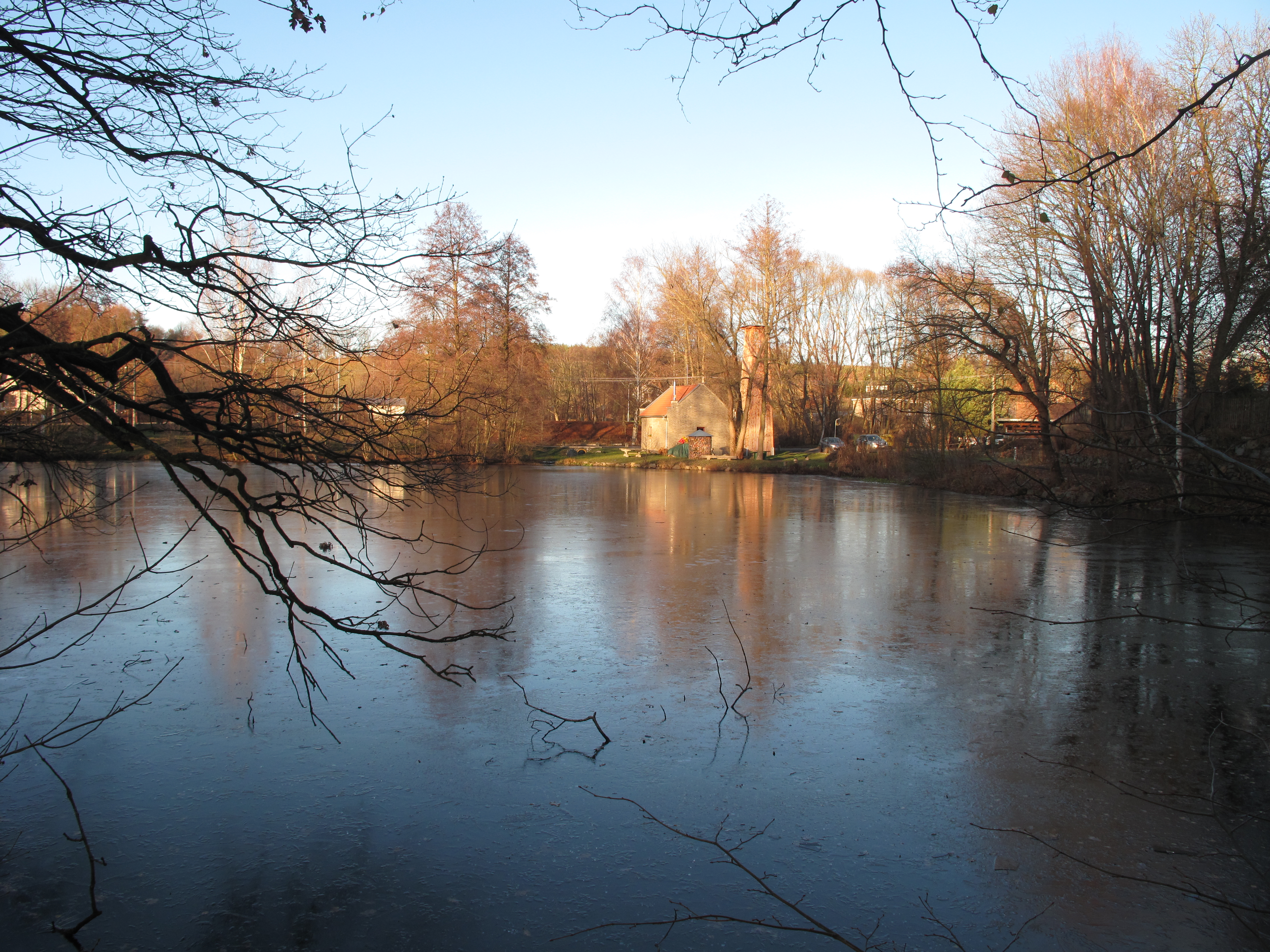 Dolní všedobrovický rybník ve Všedobrovicích, okres Praha-východ.